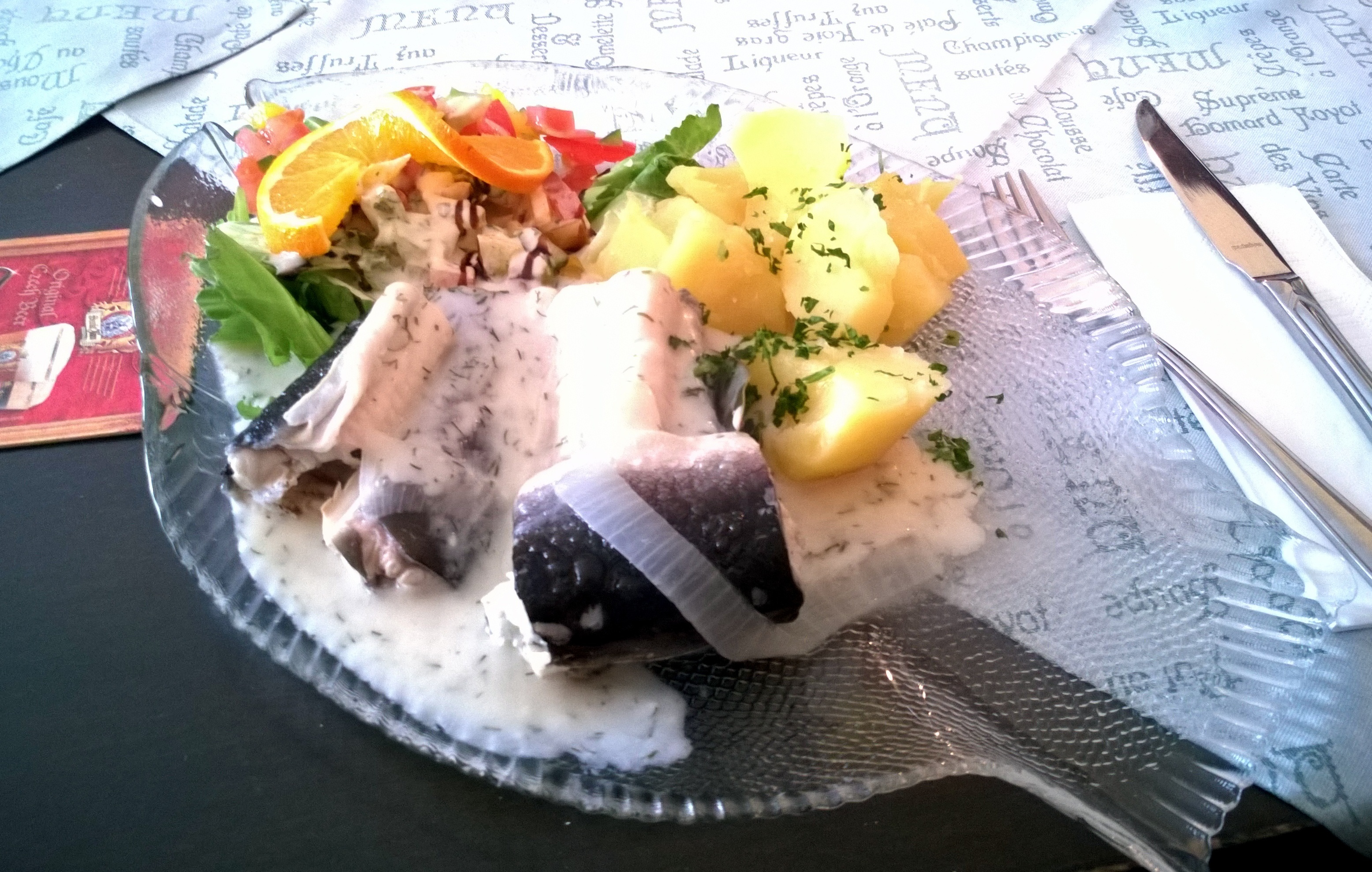 Aal grün in der Gaststätte Ebel Berlin Alt-Glienicke